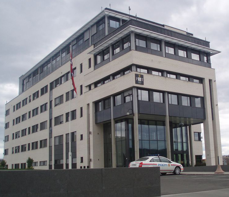 Norways version of "Homeland security", "Politiets sikkerhetstjeneste"